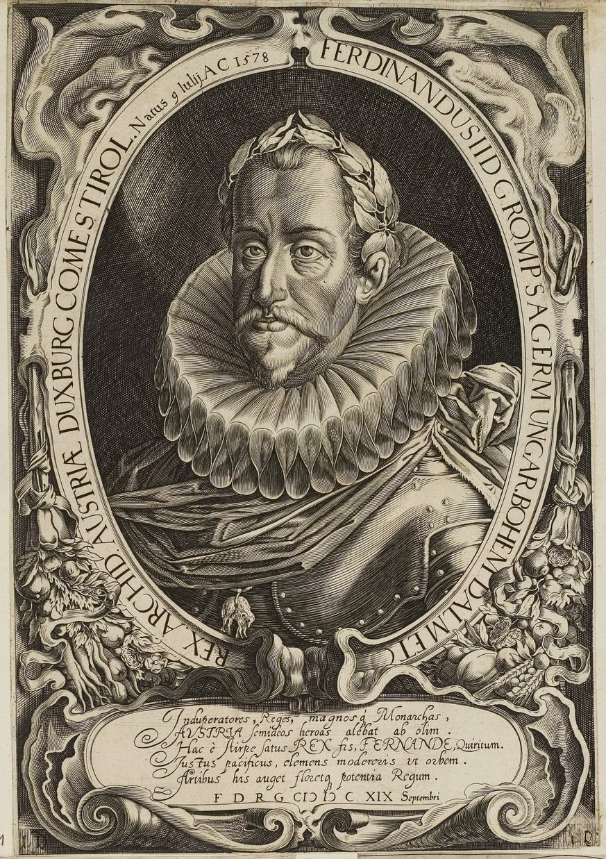 Grafik aus dem Klebeband Nr. 1 der Fürstlich Waldeckschen Hofbibliothek Arolsen Motiv: Kaiser Ferdinand II.